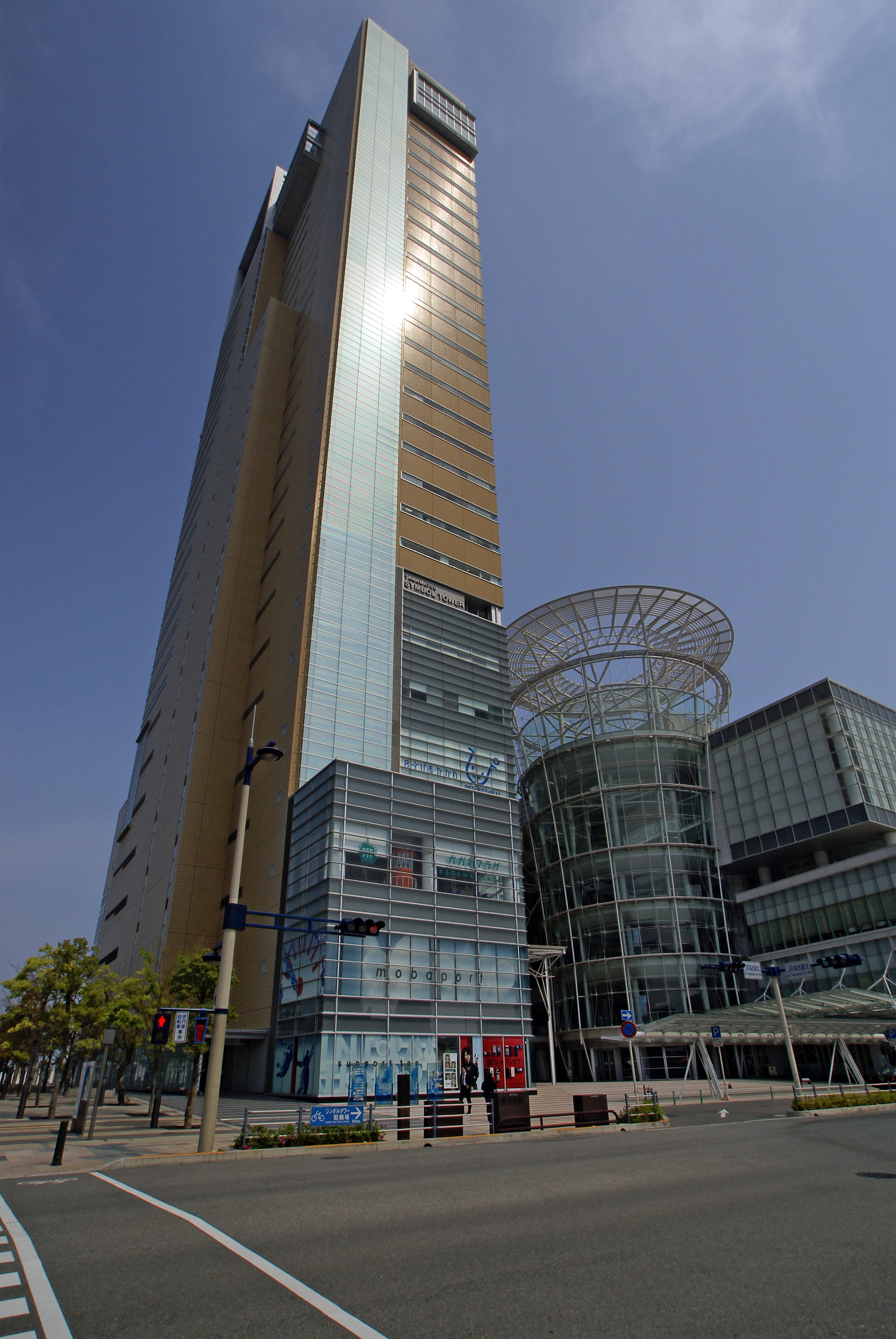 Takamatsu Symbol Tower of Sunport-Takamatsu in Takamatsu, Kagawa, Japan